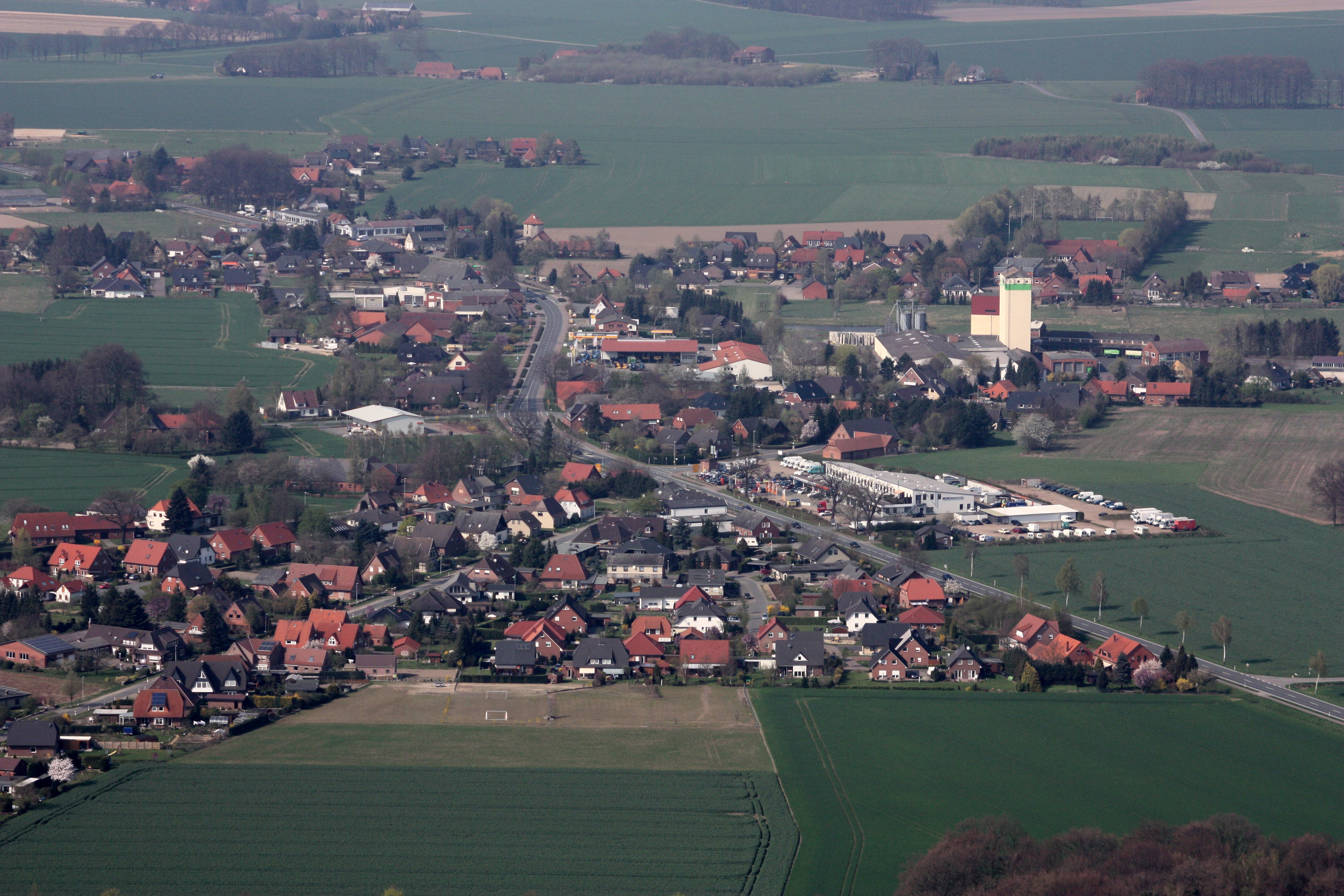 Luftbilder Heiligenfelde (Syke), Syke, Landkreis Diepholz, Niedersachsen, Deutschland; Bundesstraße 6; B6